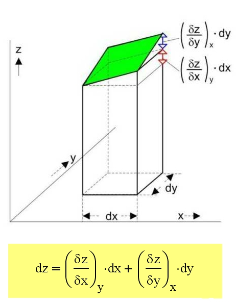 Das vollständige Differenzial